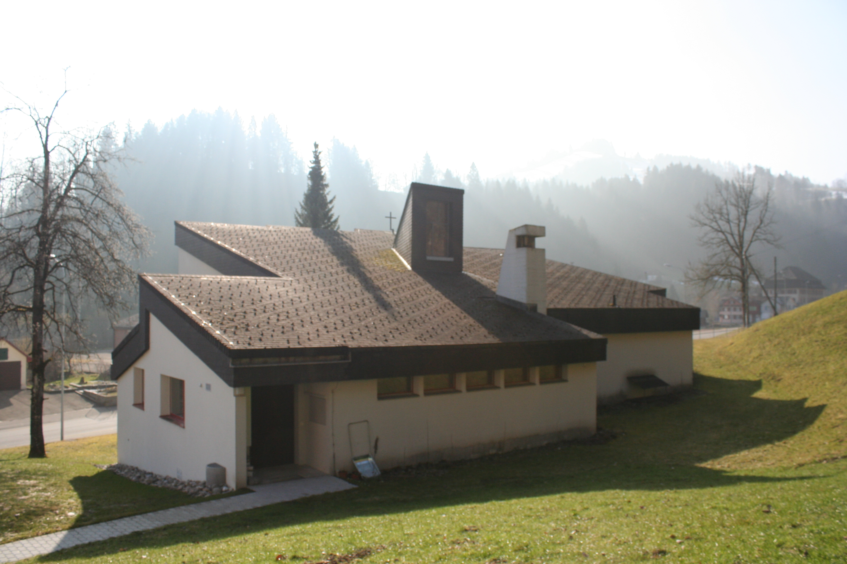 Römisch-katholische Kirche St. Gallus Fischenthal ZH, Ansicht von Norden